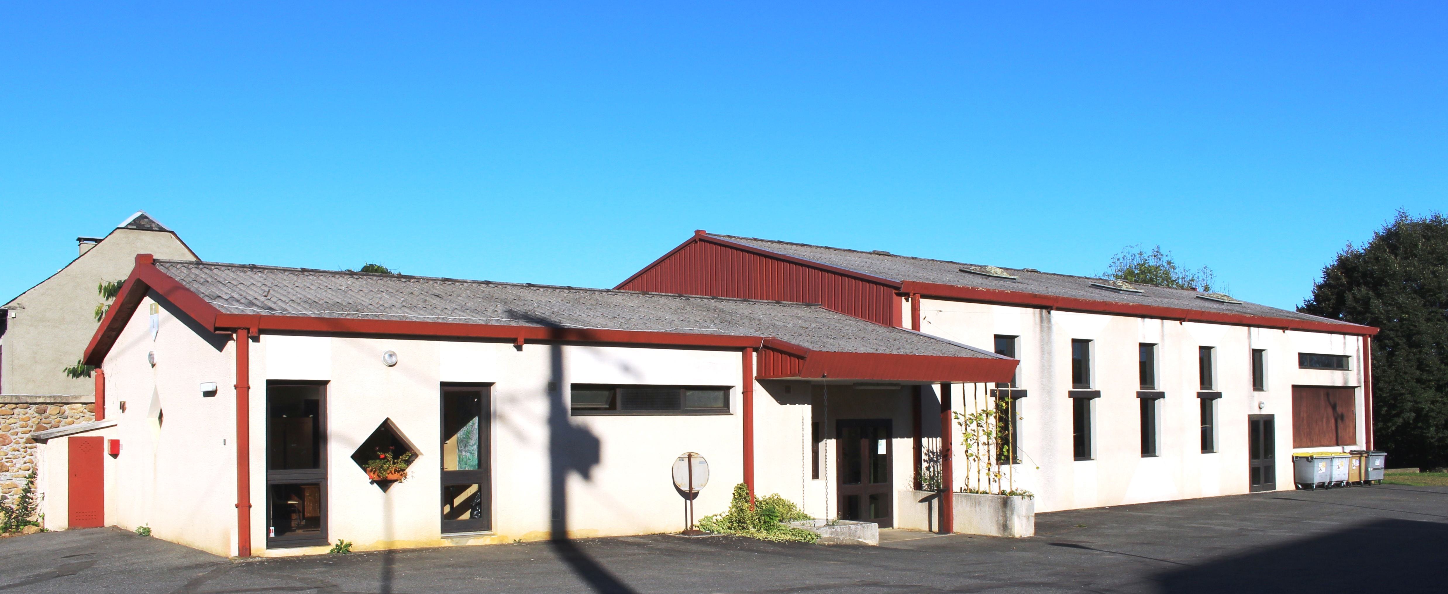 Salle des fêtes de Tilhouse (Hautes-Pyrénées)